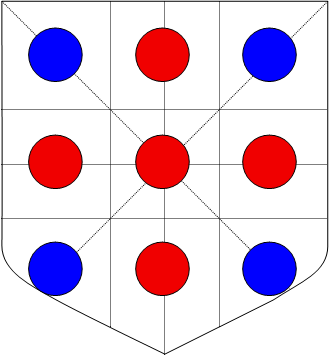 Géométrie de l'écu